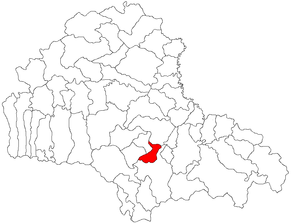 Categorie:Hărţi ale judeţului Braşov